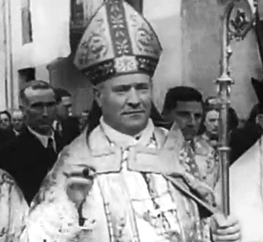 Entronización del Doctor Iglesias como Príncipe de Andorra.